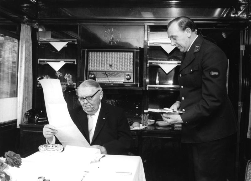 Bundeskanzler Prof. Ludwig Erhard bevorzugt auf seinen Dienstreisen durch die Bundesrepublik Deutschland die Bundeseisenbahn. Einige Sonderwagen sind mit allen Mitteln der Technik ausgerüstet, damit der Bundeskanzler ständig in Verbindung mit der Regierungszentrale in Bonn sein kann. Im Bild: Bundeskanzler Prof. Erhard im Arbeitsraum seines Sonderwagens beim Studium der neuesten Nachrichteneingänge.